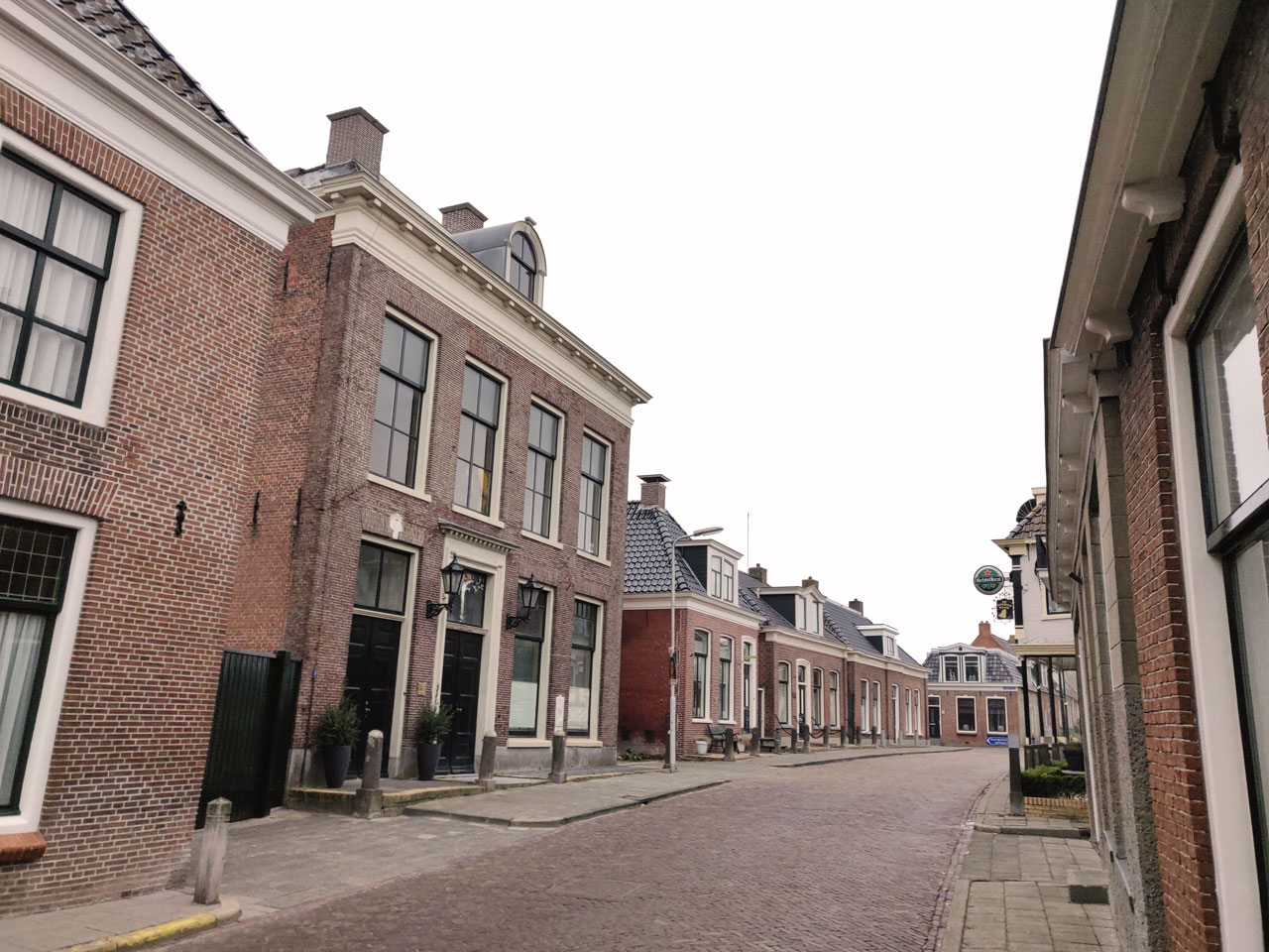 Foarstrjitte in Holwerd met het oude postkantoor (PTT).